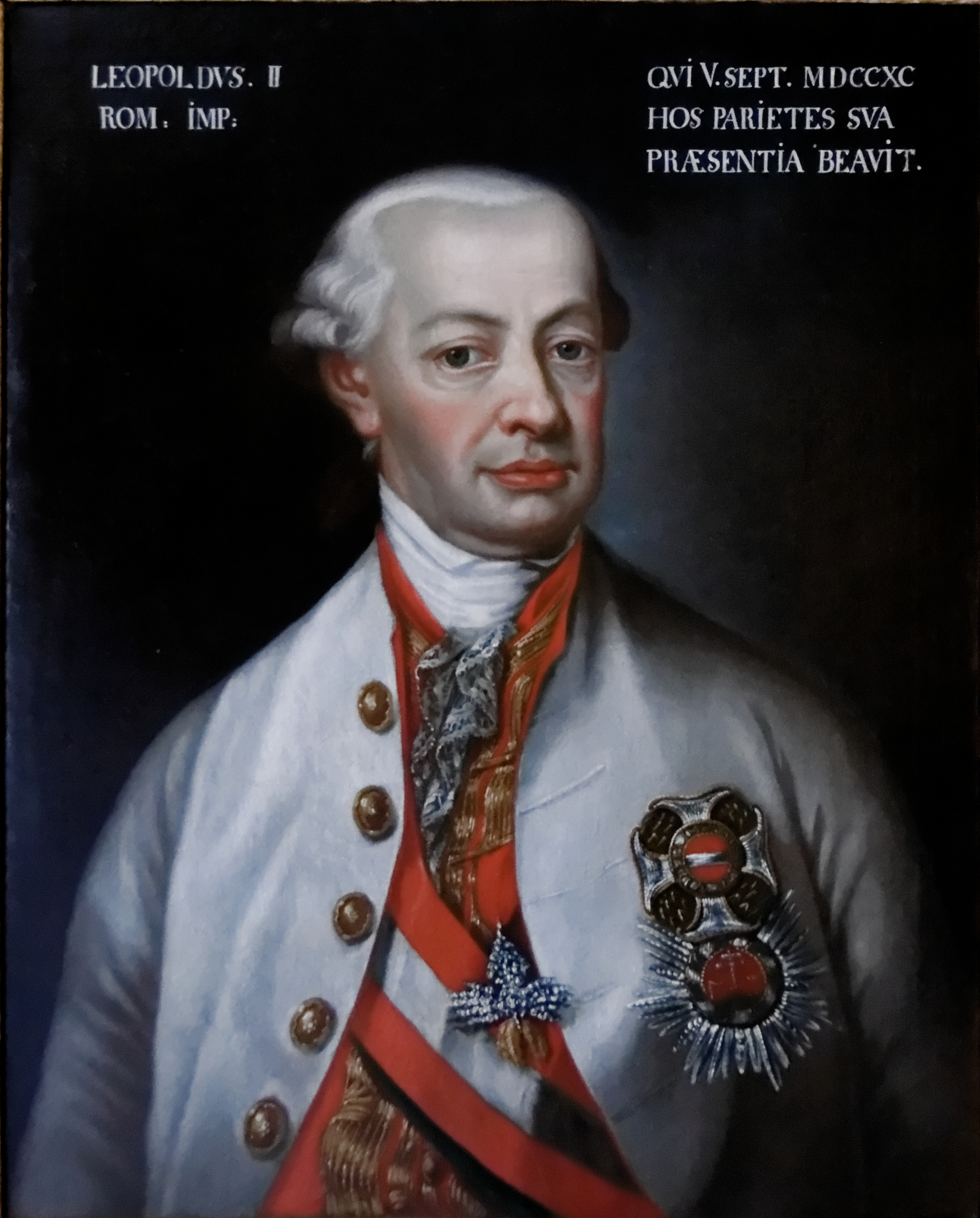 Emperor Leopold II. c 1791-92.label QS:Lde,"Kaiser Leopold II"label QS:Len,"Emperor Leopold II. c 1791-92."label QS:Lfr,"L'Empereur Leopold II. vers 1791-92"